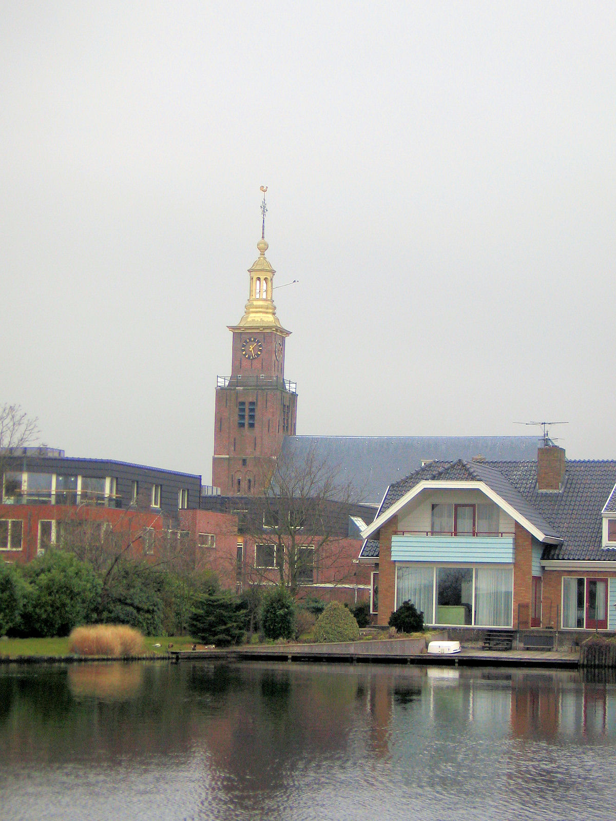 Rijnwoude and surroundings